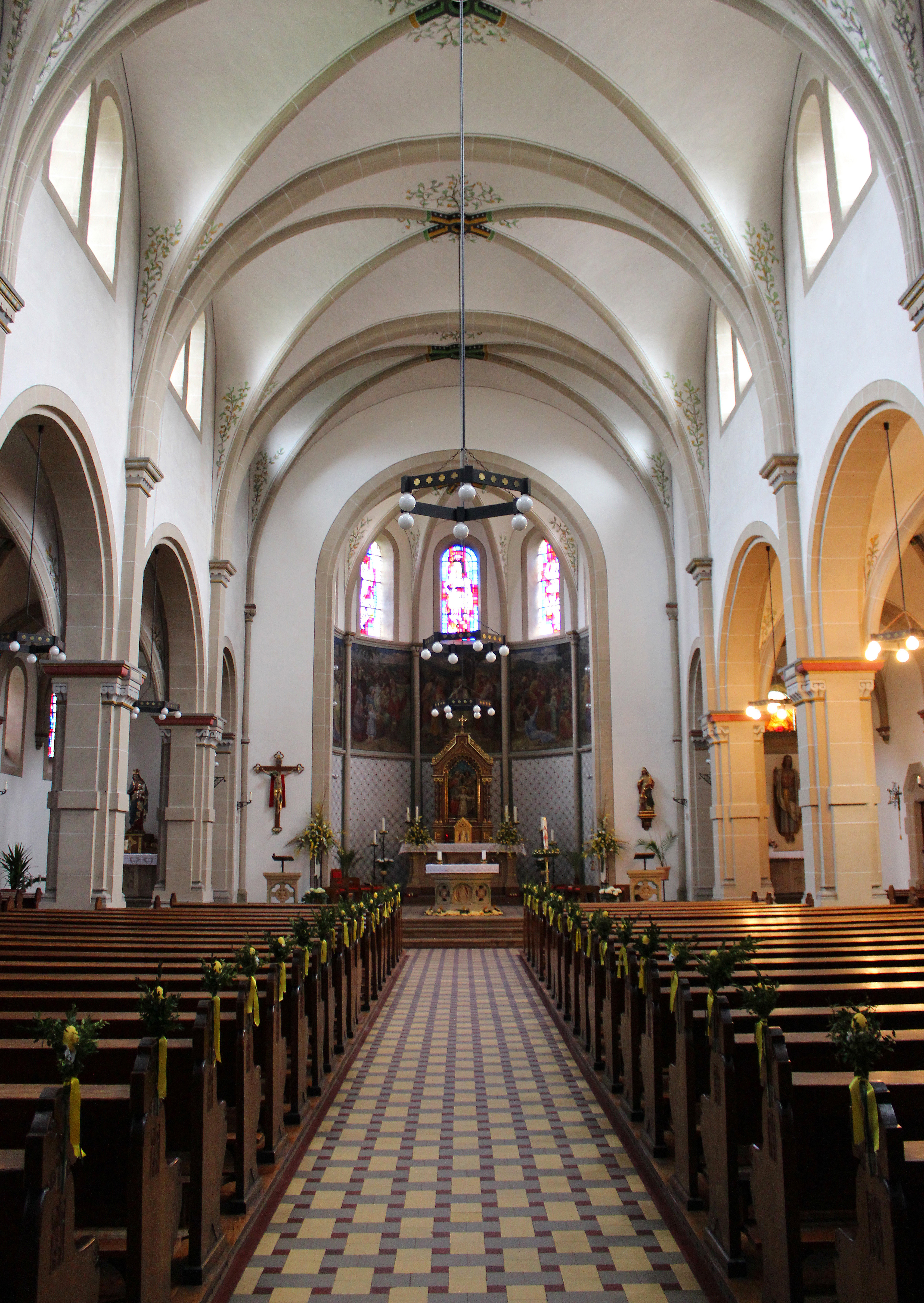 Blick ins Innere der katholischen Pfarrkirche St. Maria Magdalena in Hüttigweiler, einem Ortsteil der Gemeinde Illingen, Landkreis Neunkirchen, Saarland